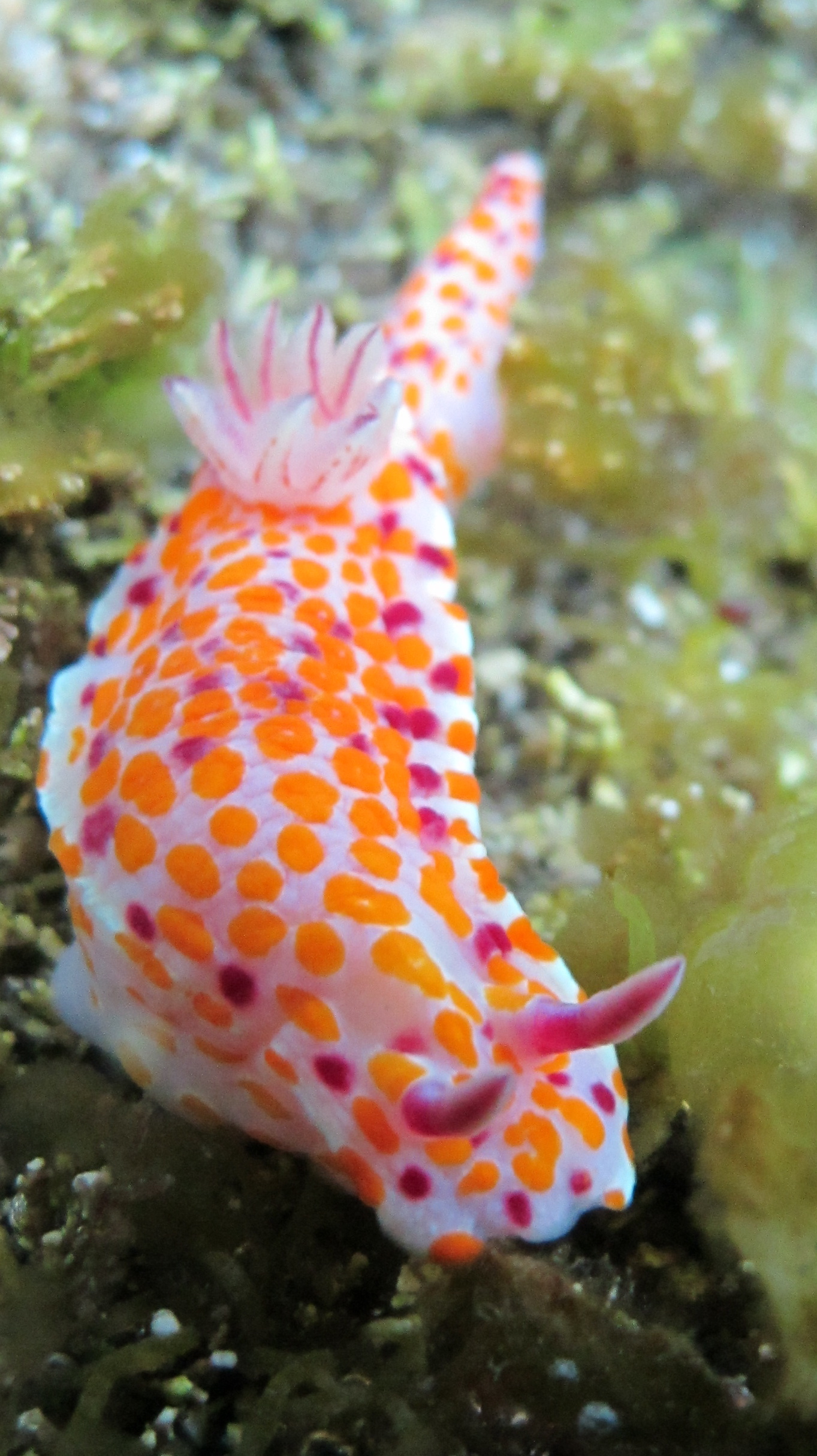 Ceratosoma amoenum, Sydney, Australia